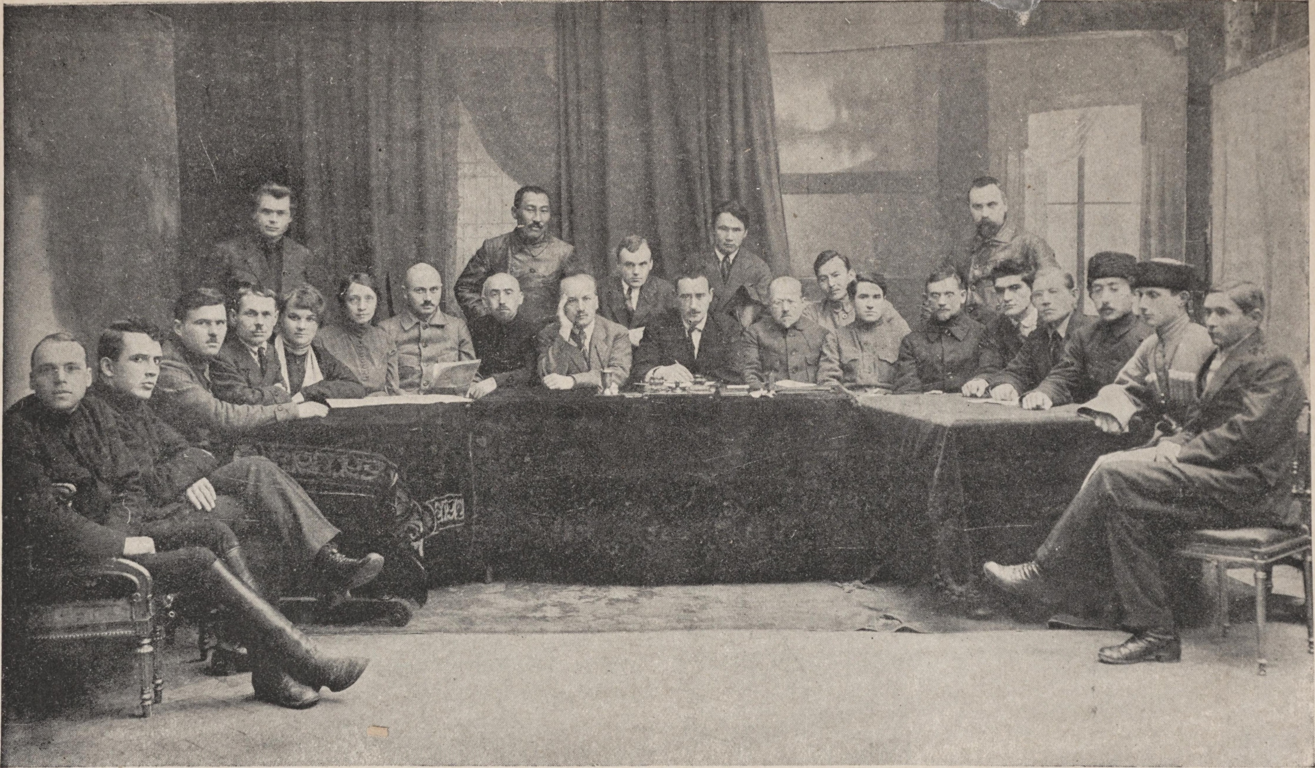 Sultan Galiyev (Mihail Pavloviç'in solunda) ve Milliyetler Sovyeti üyeleri.